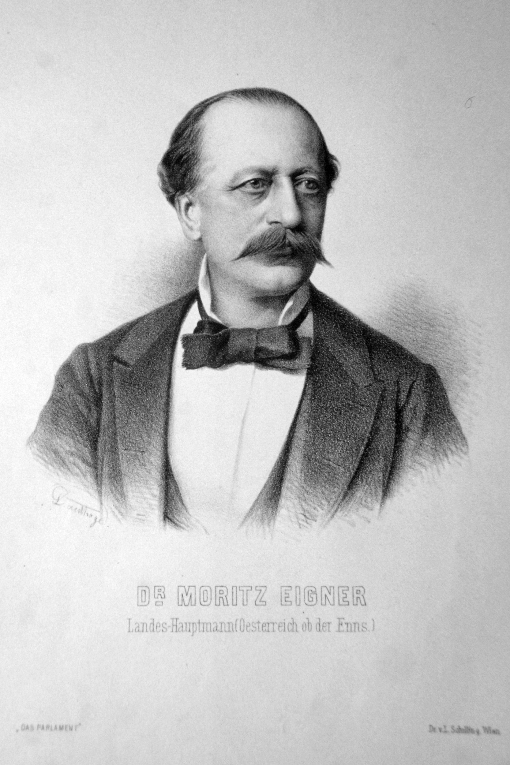 Dr. Moritz von Eigner (1822-1900), Jurist, Landeshauptmann von Oberösterreich, Mitglied des Herrenhauses. Lithographie von Adolf Dauthage, ca. 1880